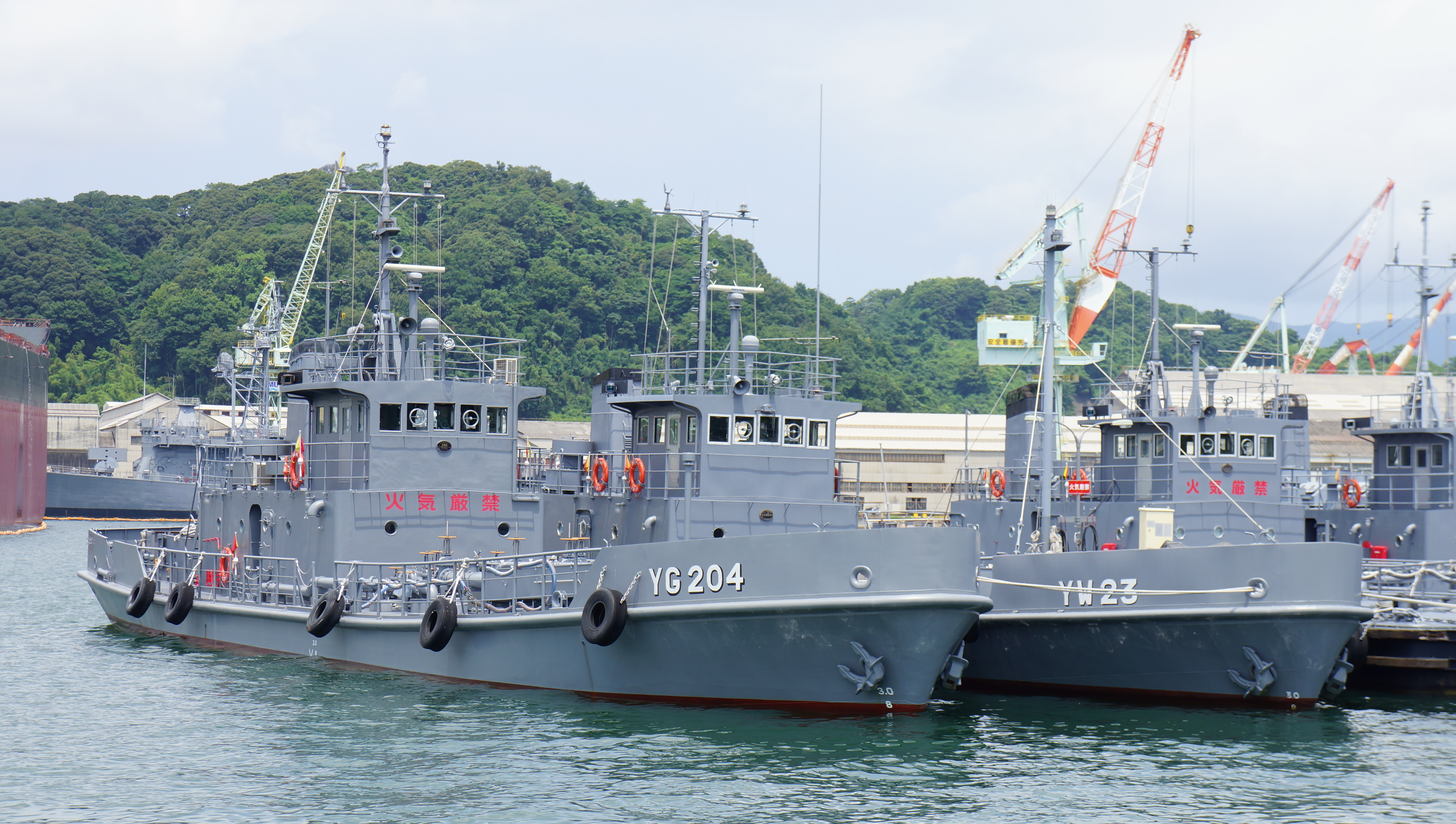 海上自衛隊 油船203号（YO-203）及び油船23号（YW-23）。 14年7月27日 海上自衛隊舞鶴基地にて。